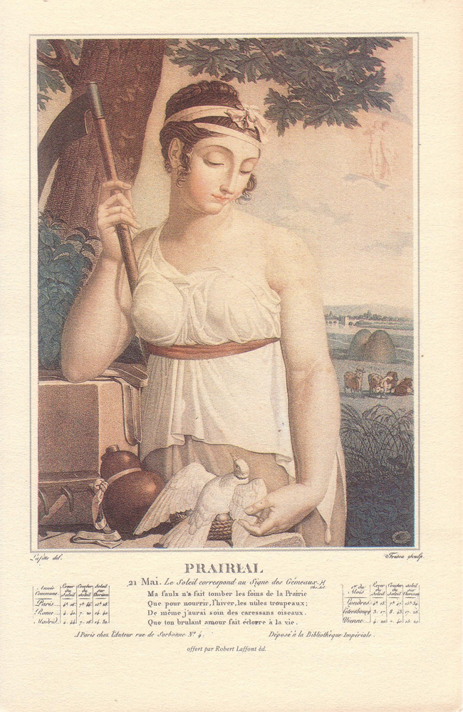 French Revolutionary Calendar PRAIRIAL 21 Mai: Le Soleil correspond au Signe des Gémeaux Ma faulx n'a fait tomber les foins de la Prairie Que pour nourrir l'hiver les utiles troupeaux De même j'aurai soin des carressans oiseaux Que ton brulant amour fait éclorre à la vie